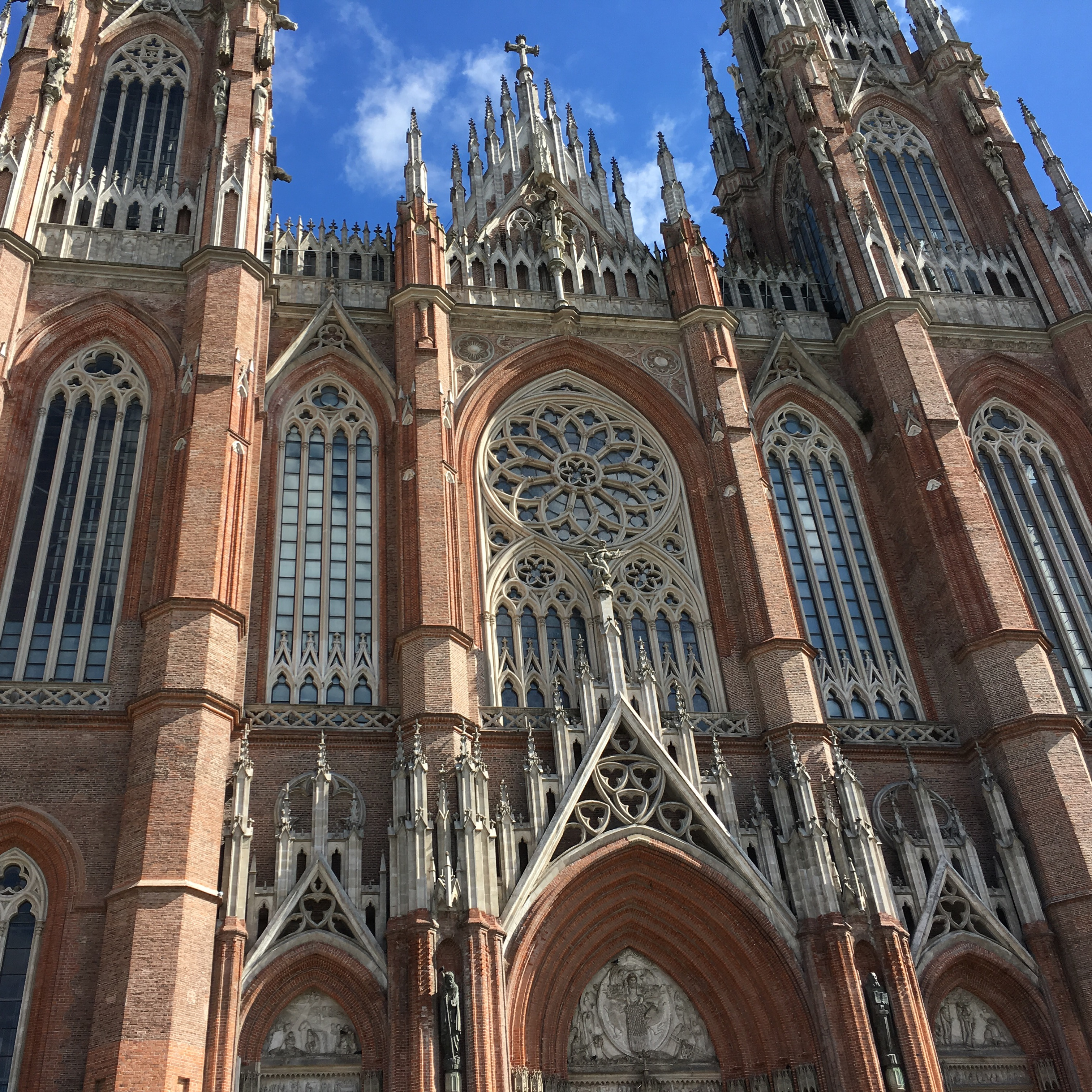 Imponente fachada principal de la Catedral